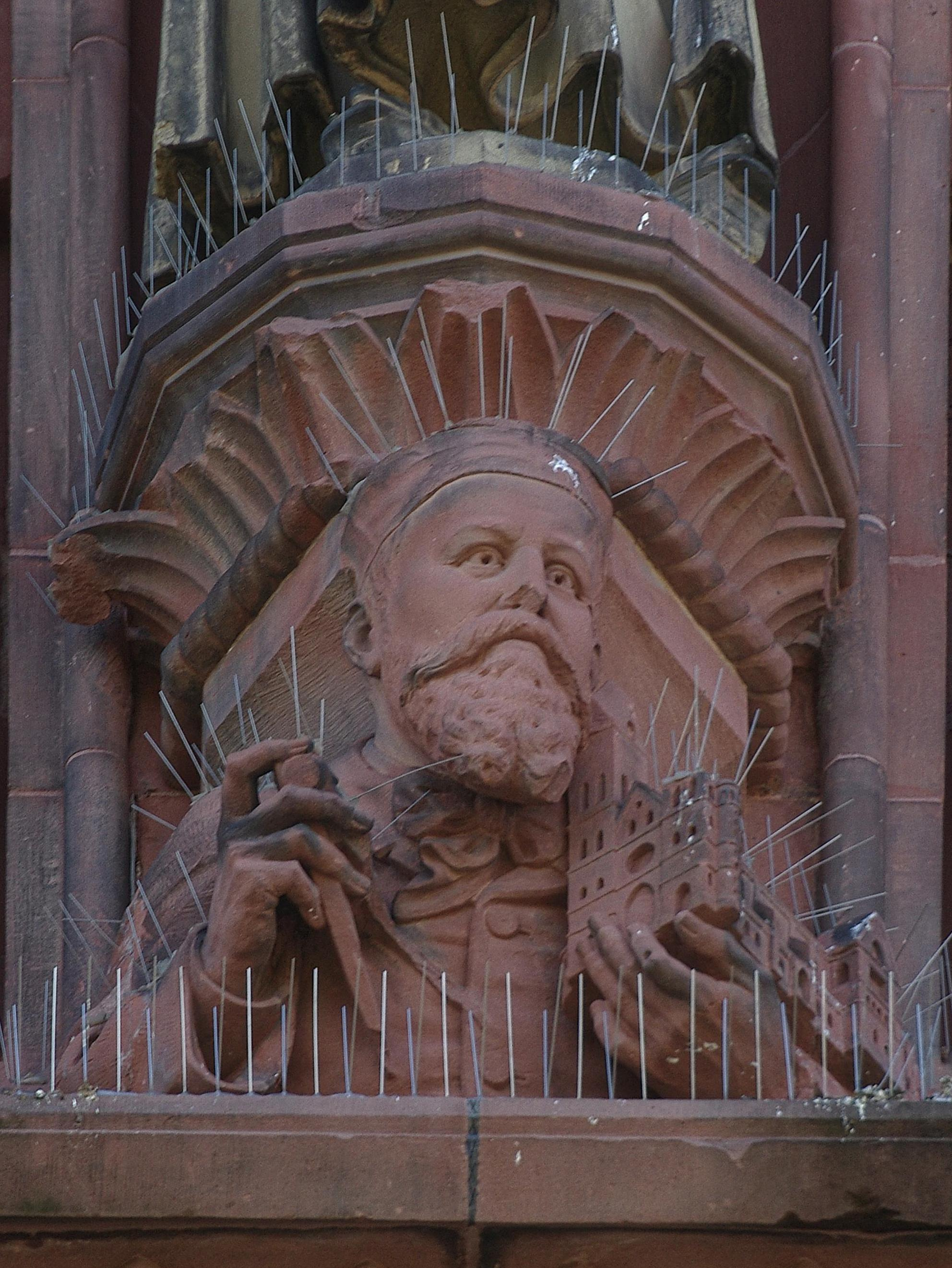 Das Bildnis Max Meckels im Giebelfeld, mit einem Modell der Kirche in der Hand